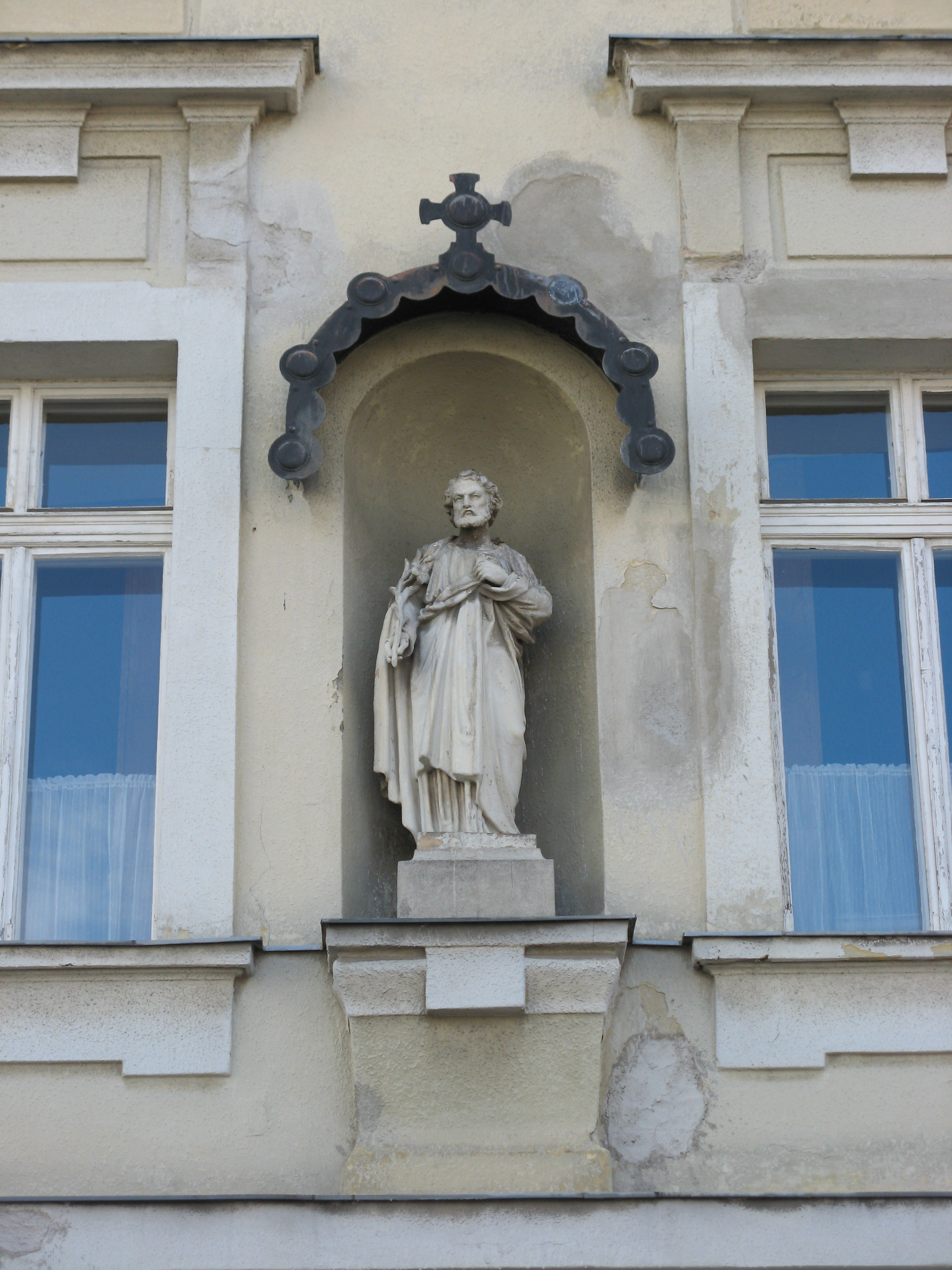 Nischenfigur des hl. Josef an der Front der Klosterkirche der Kreuzschwestern in Wien-Meidling (1904/05)